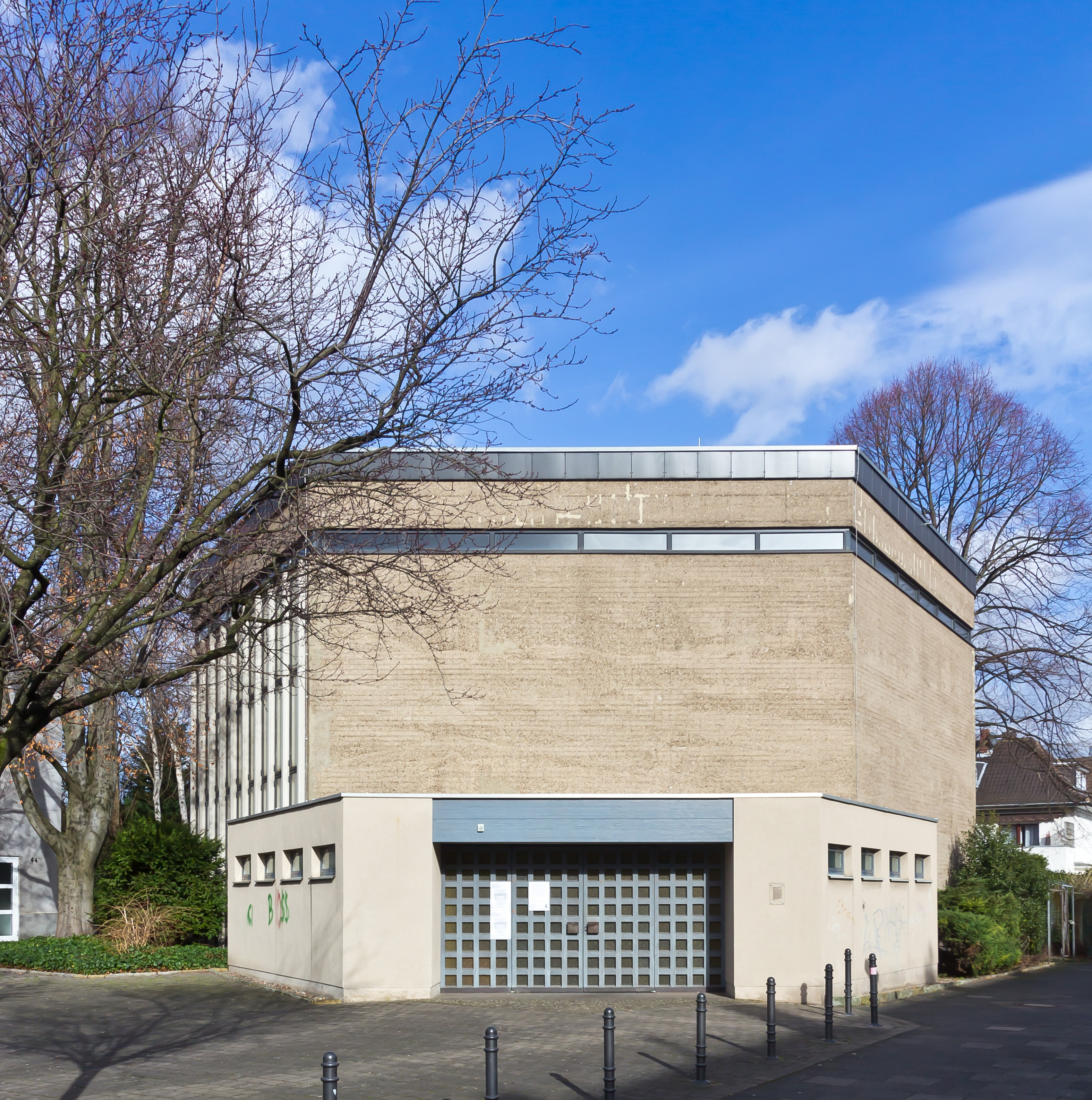 Evangelische Versöhnungskirche, Köln-Neuehrenfeld. Grundsteinlegung 7. Juli 1963, Einweihung 31. Mai 1964, Architekten: Dr. Ing. F.W. Bertram und Dr. Ing. Lang, Aachen.